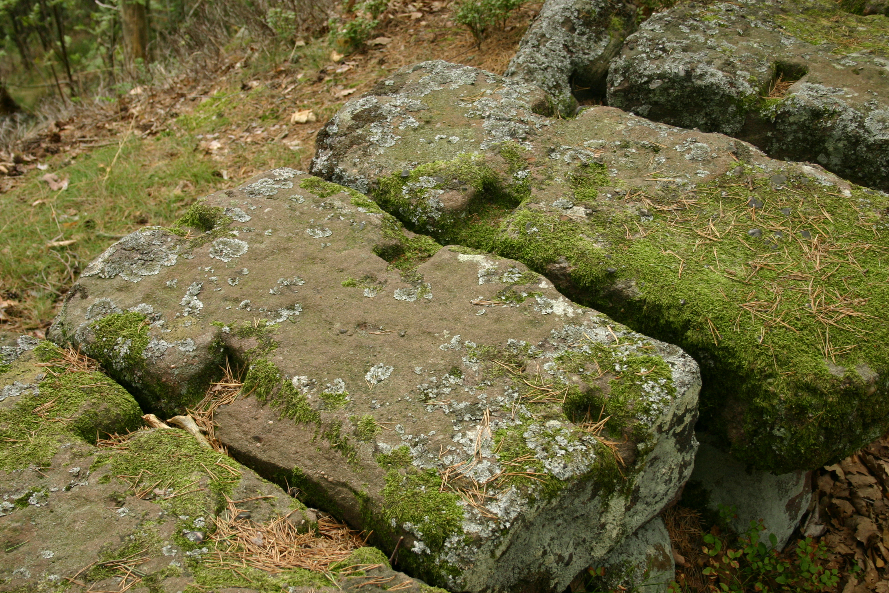 Odilienberg, Heidenmauer, Steine mit Aussparungen für die Verbindungsklammern/Le mur païen